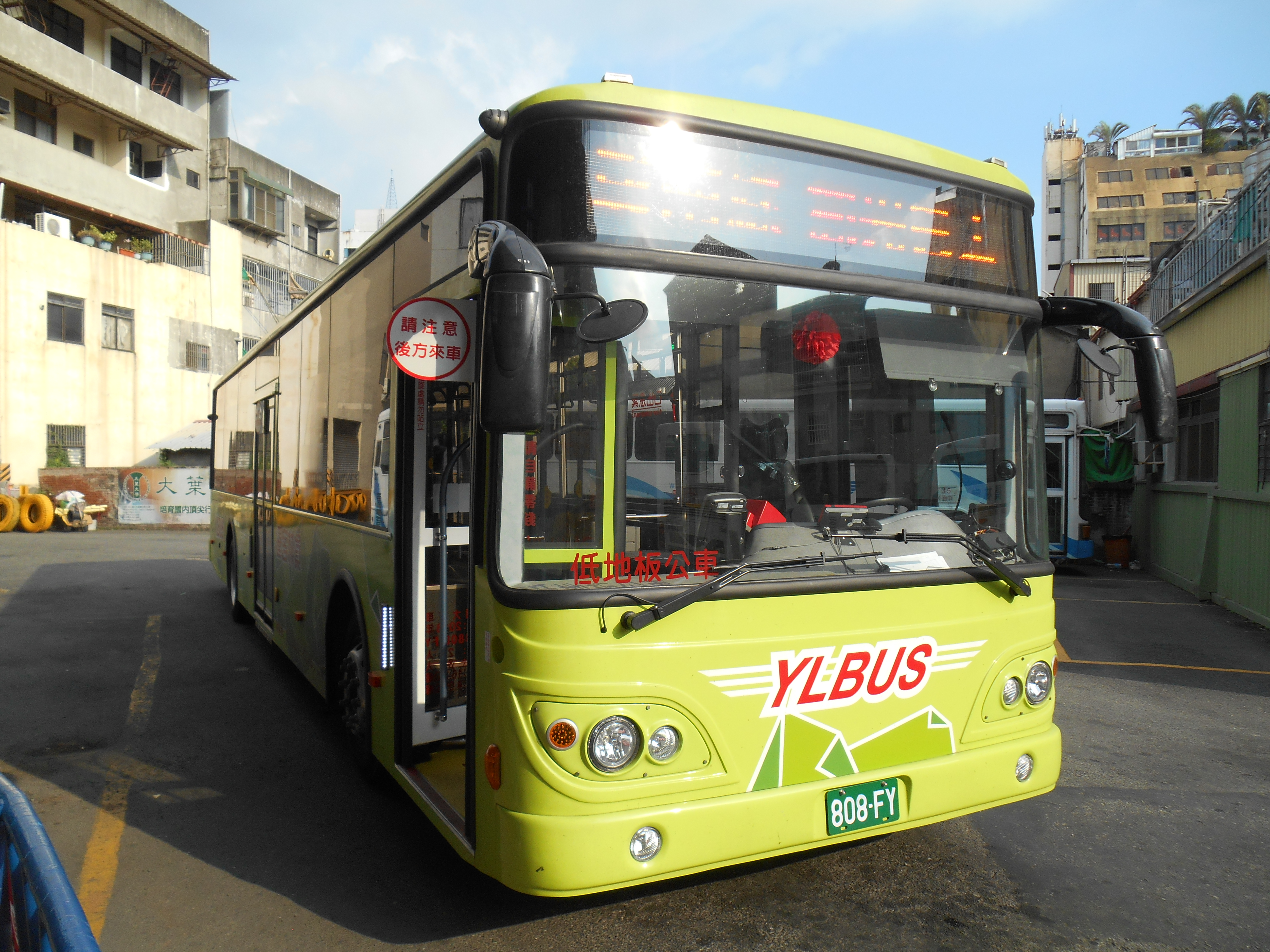 員林客運2014 DAEWOO BS120SN (五期引擎)